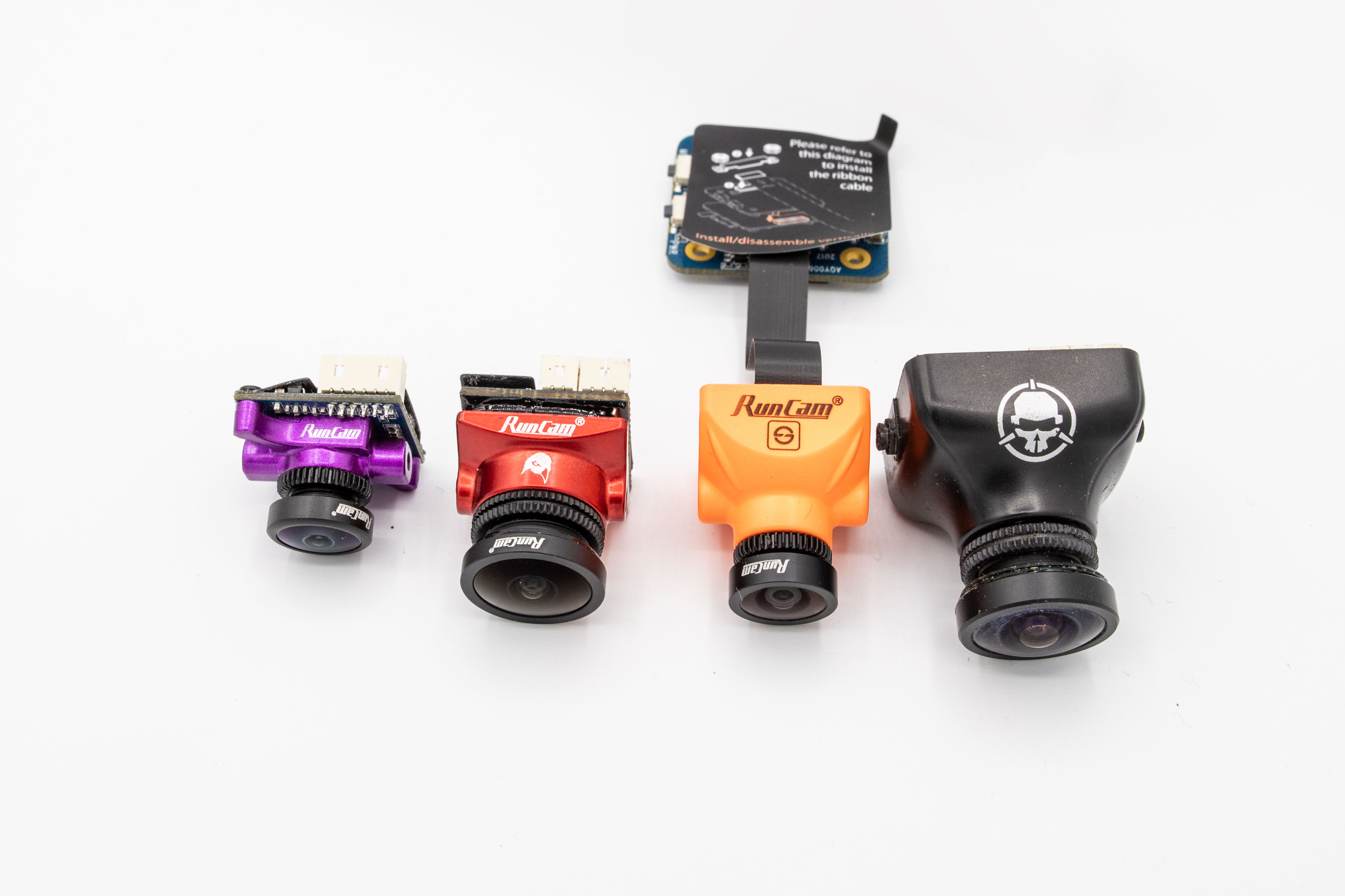 Unterschiedliche Formfaktoren und Größen für diverse Einsatzbereiche im FPV.